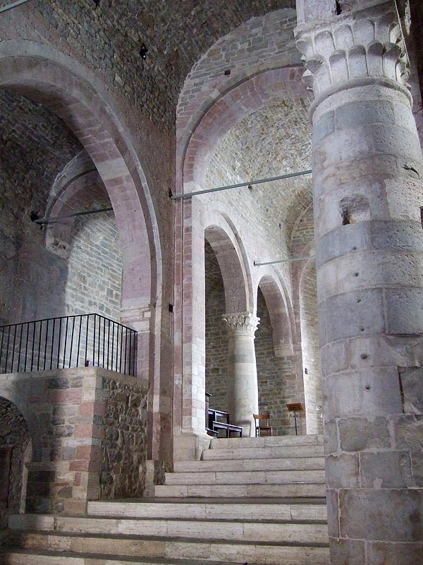 Bevagna, San Silvestri - nave